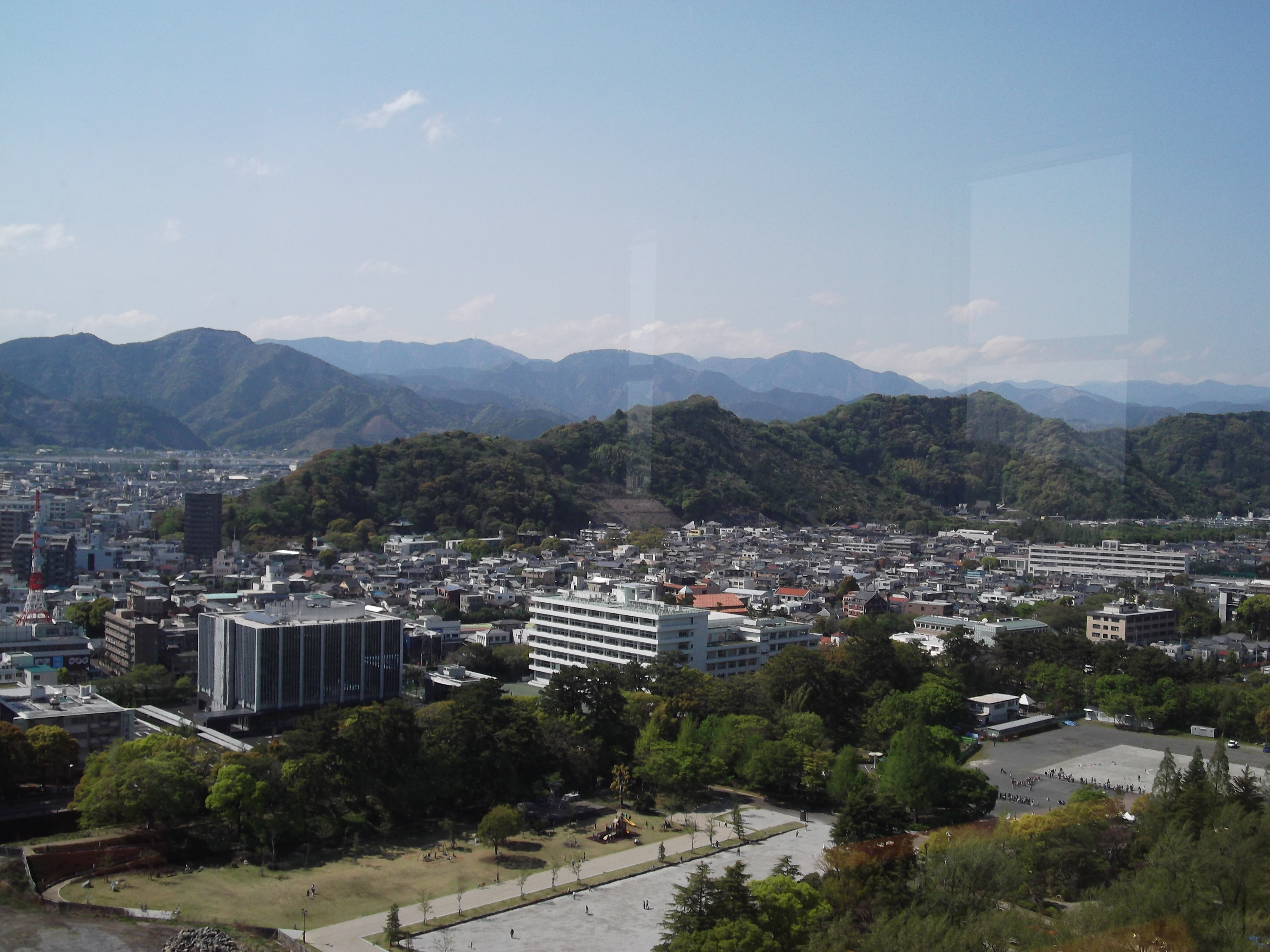 静岡市の賤機山。静岡県庁舎21階展望フロアより。